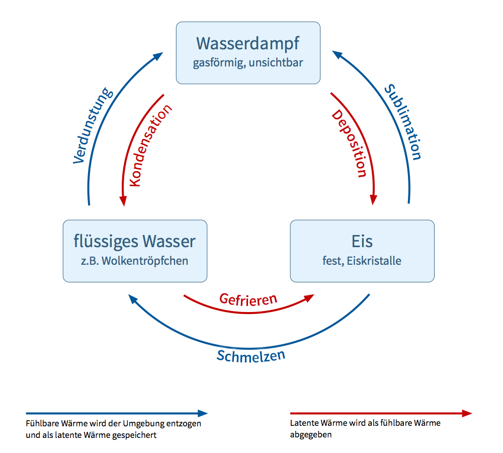 Phasenübergänge des Wassers (Energieumsätze)